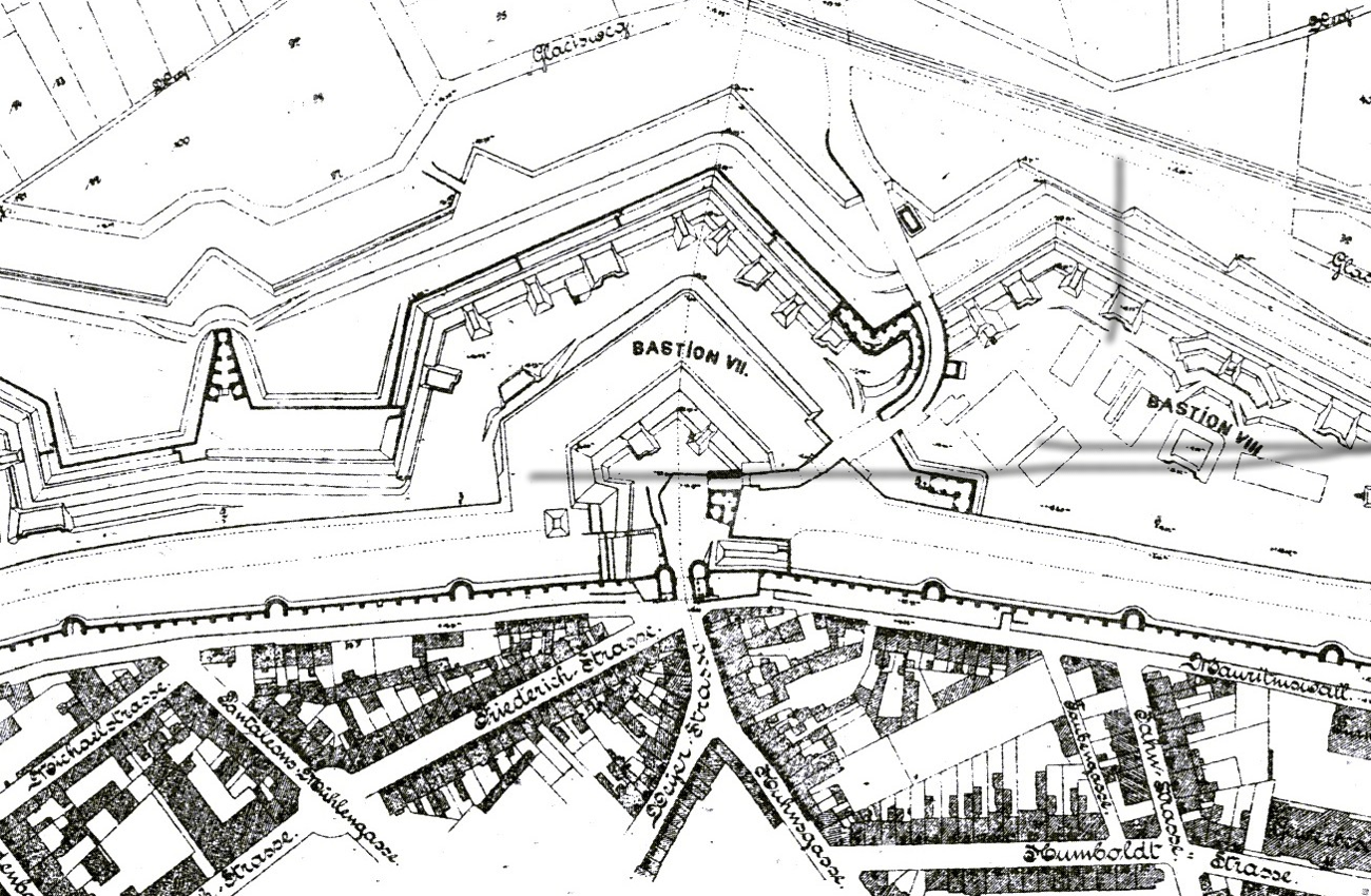 Ausschnitt der Inneren preußischen Wallanlage auf Höhe Barbarossaplatz in Köln aus dem Jahr 1881